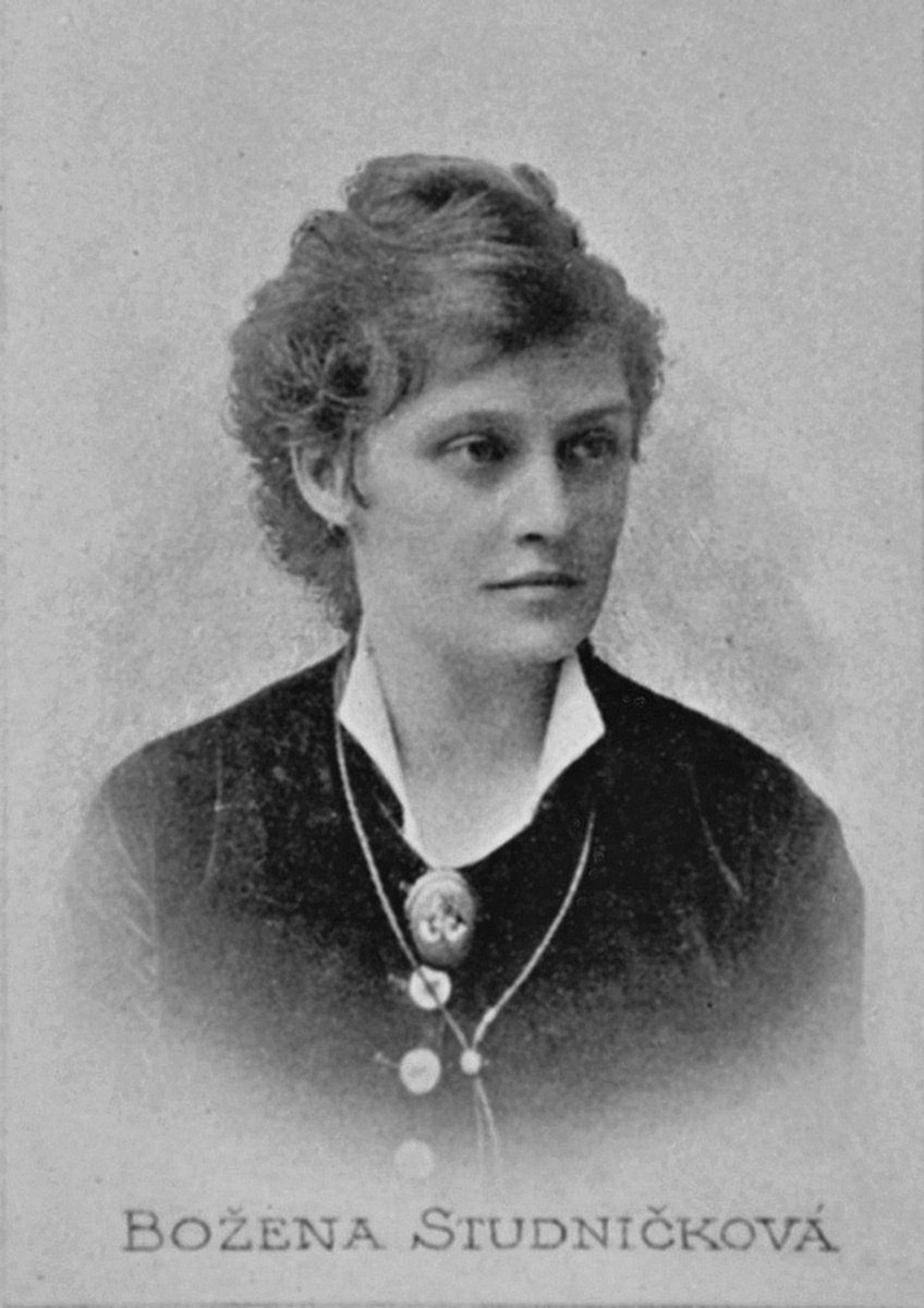 Portrét – Božena Studničková (1849-1934), Česká spisovatelka.